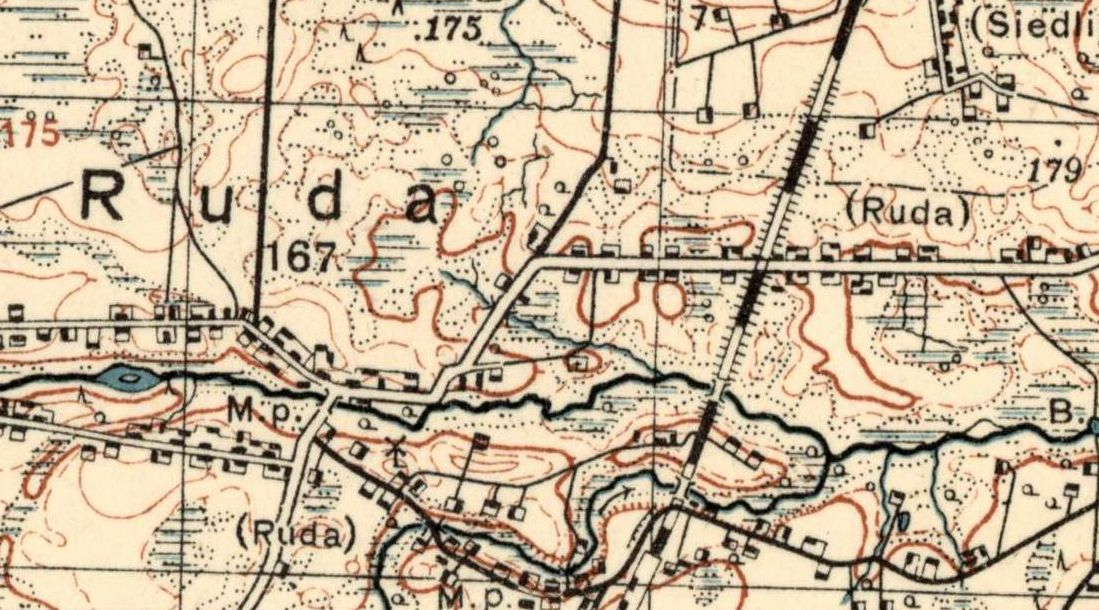 Fagment mapy wojskowej z 1933 r. obejmujący wieś Rudę